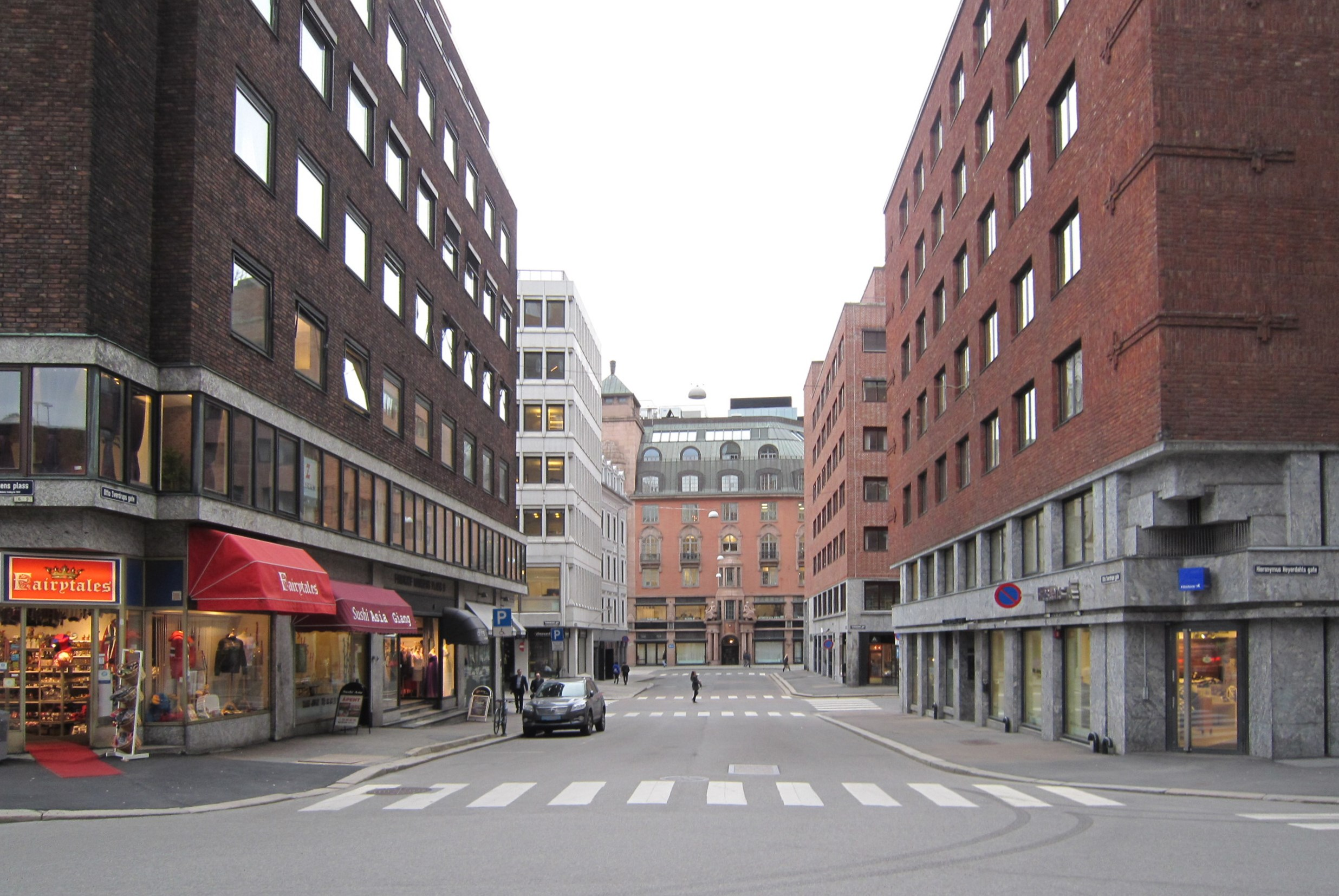 Otto Sverdrups gate i Oslo sentrum